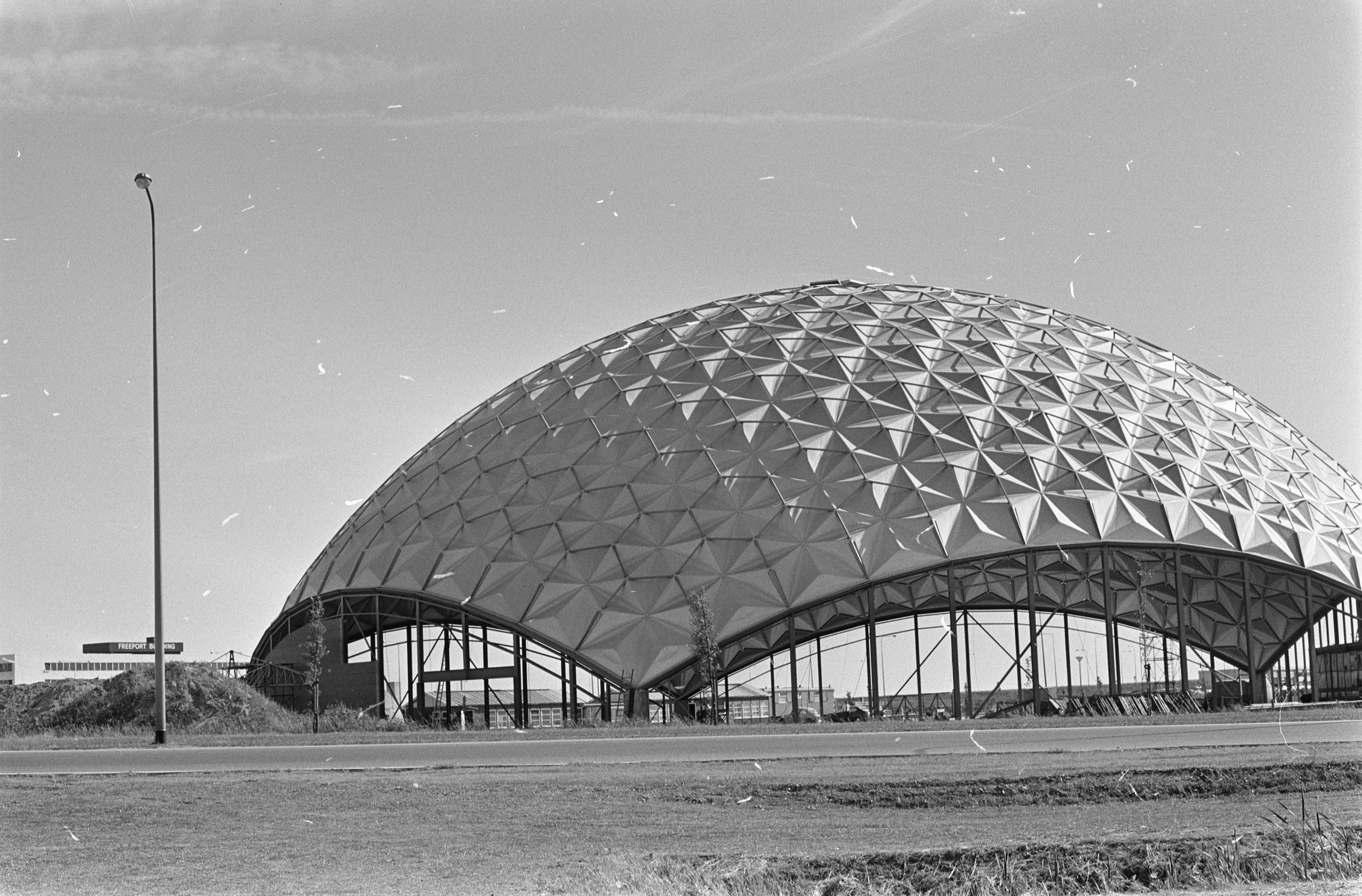 Collectie / Archief : Fotocollectie Anefo Reportage / Serie : Aviodome op Schiphol Beschrijving : Aviodome op Schiphol in opbouw in de avondzon Datum : 26 juni 1969 Locatie : Haarlemmermeer, Noord-Holland Trefwoorden : bouwmaterialen, museums Fotograaf : Fotograaf Onbekend / Anefo Auteursrechthebbende : Nationaal Archief Materiaalsoort : Negatief (zwart/wit) Nummer archiefinventaris : bekijk toegang 2.24.01.05 Bestanddeelnummer : 922-5757